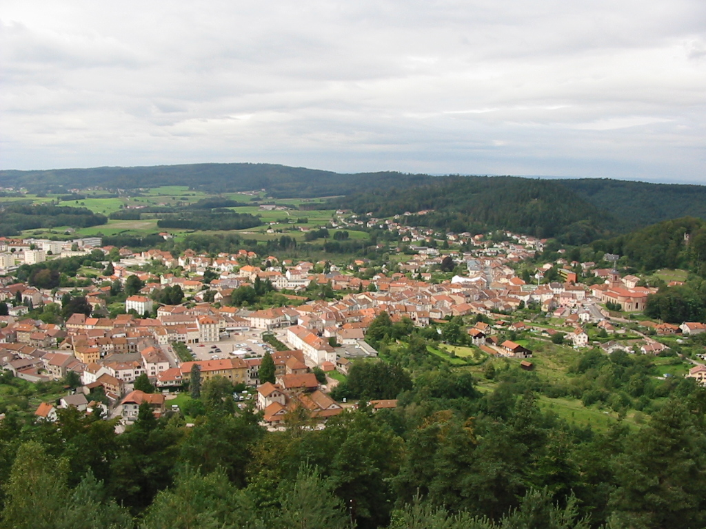 Bruyères Commune des Vosges Vue depuis la Tour de l'Avison Photographie personnelle, prise le 28 août 2004 Copyright © Christian Amet